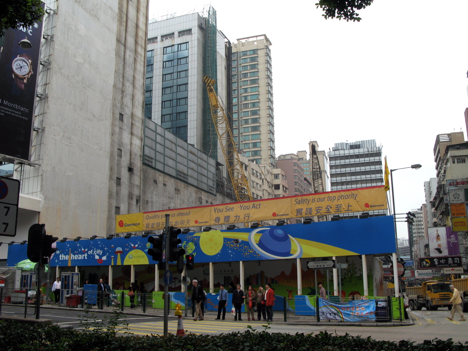 Tung Ying Building Site 正在拆卸的東英大廈